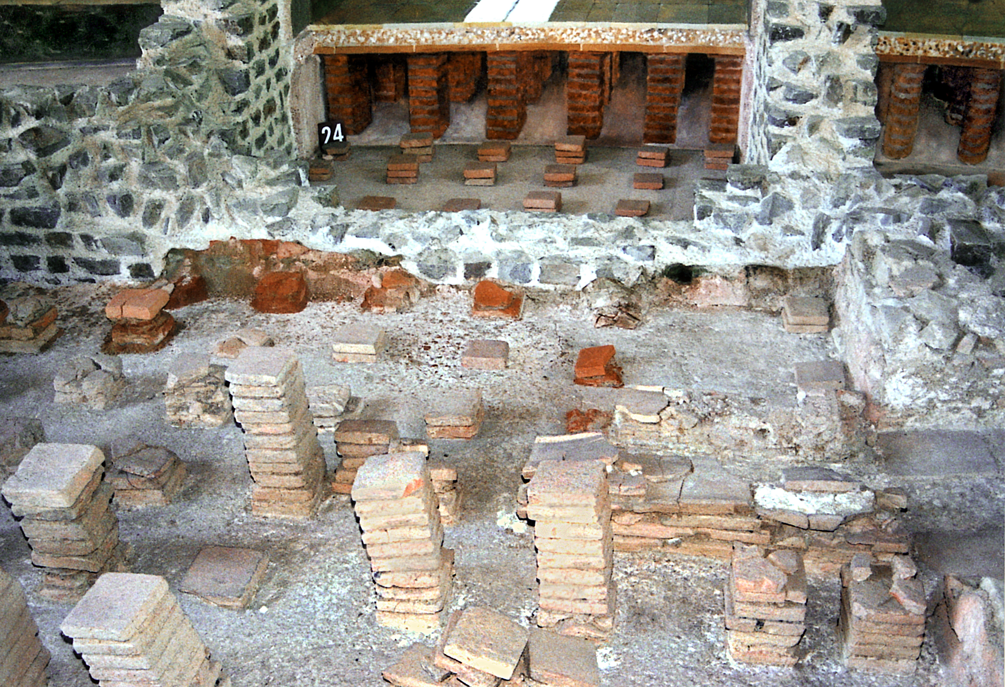 Villa Rustica Ahrweiler, Bad II: Blick vom Apodyterium (Umkleideraum) in einen weiteren heizbaren Raum (Nr. 24), der wahrscheinlich ein Tepidarium (Warmbad) gewesen ist. Photographiert mit einer Minolta X 700, einem Tokina 28-70-mm-Objektiv und dem Metz mecablitz 32 CT3 (System SCA 300)